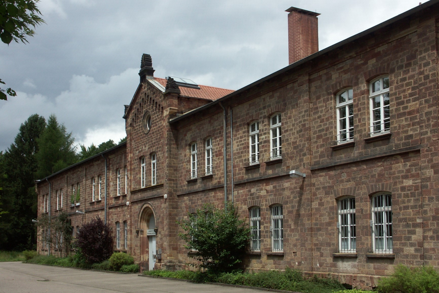 ehemaliges Schlafhaus für Bergmänner der früheren Grube Von der Heydt